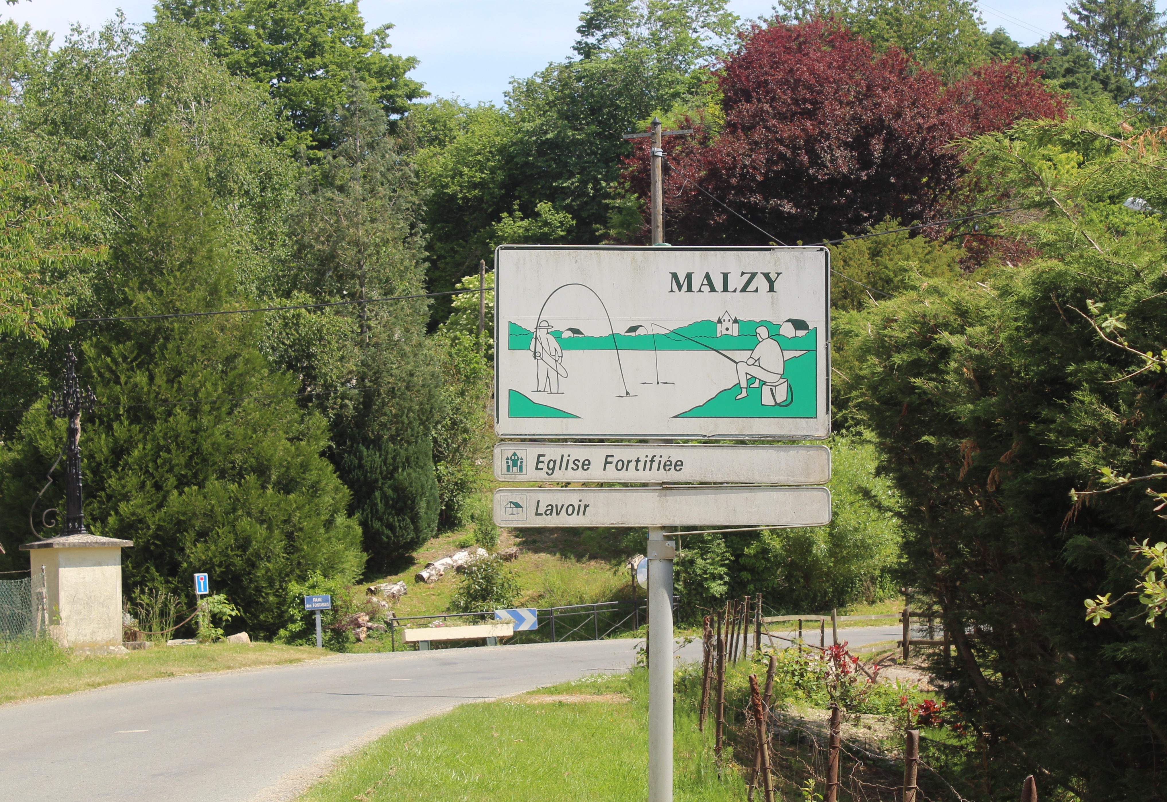 Entrée du village